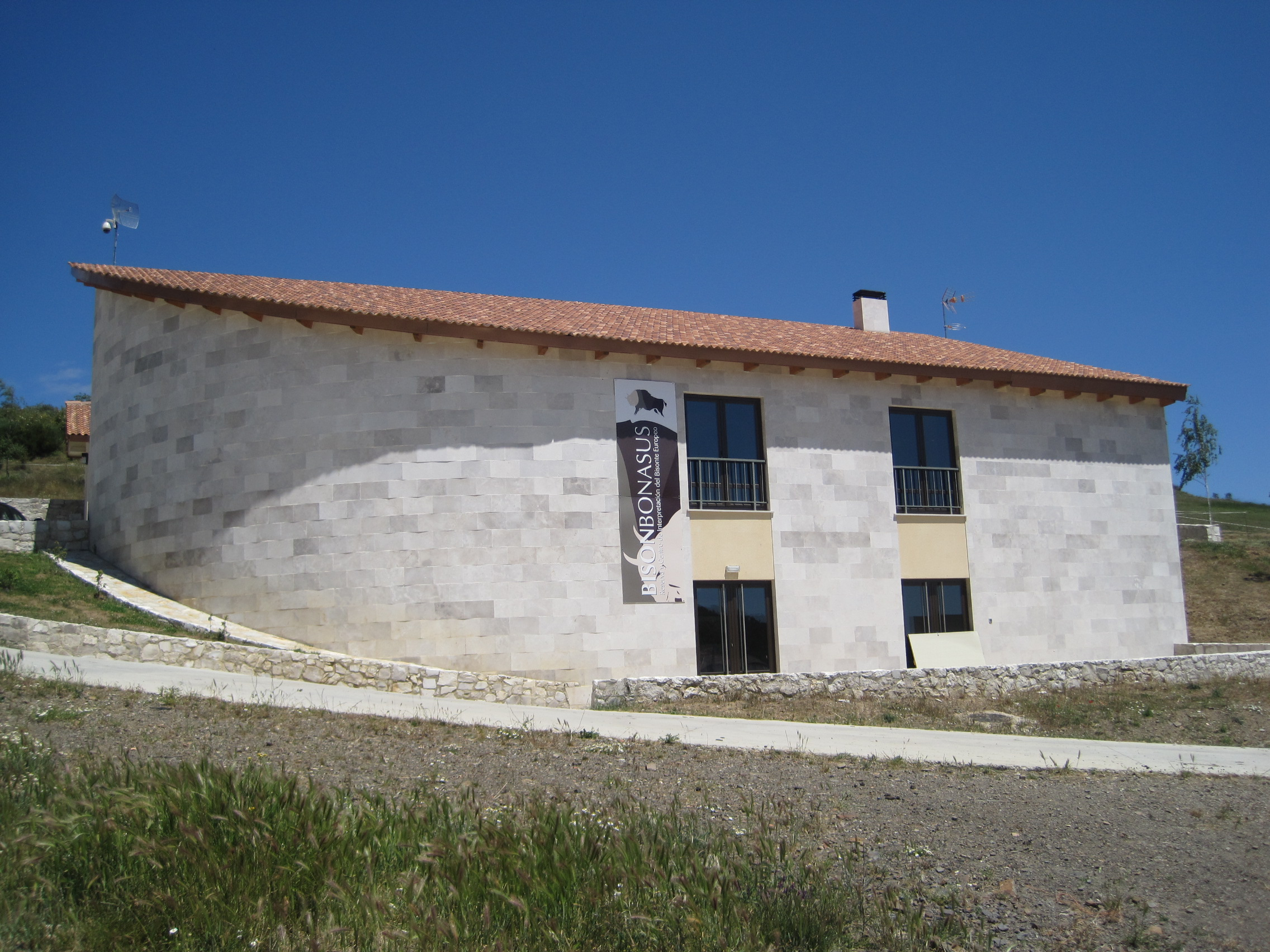 Fachada del Centro de Interpretación del Bisonte Europeo, en San Cebrián de Mudá (Palencia, España).